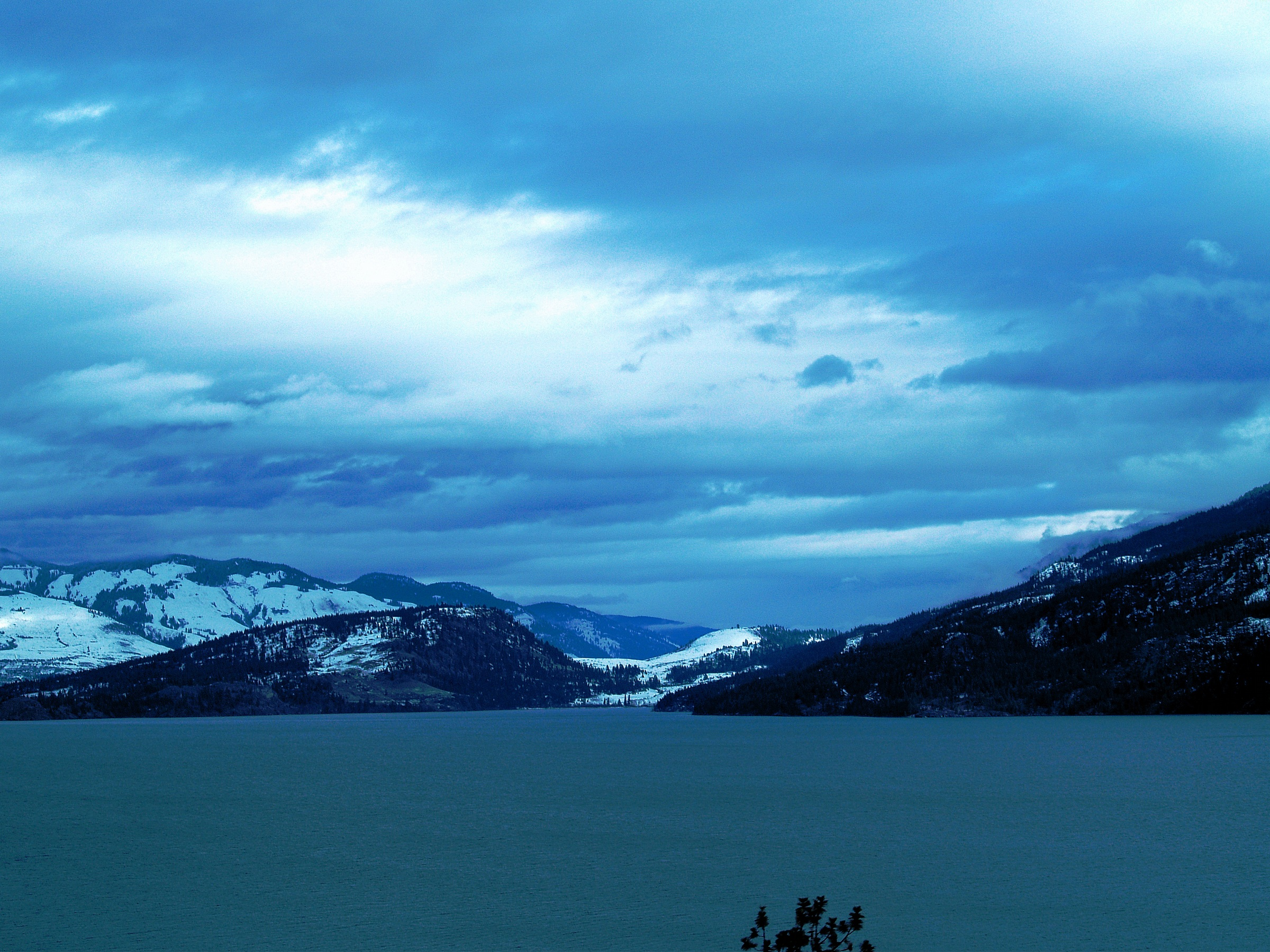 Winter Morning over Kalamalka Lake